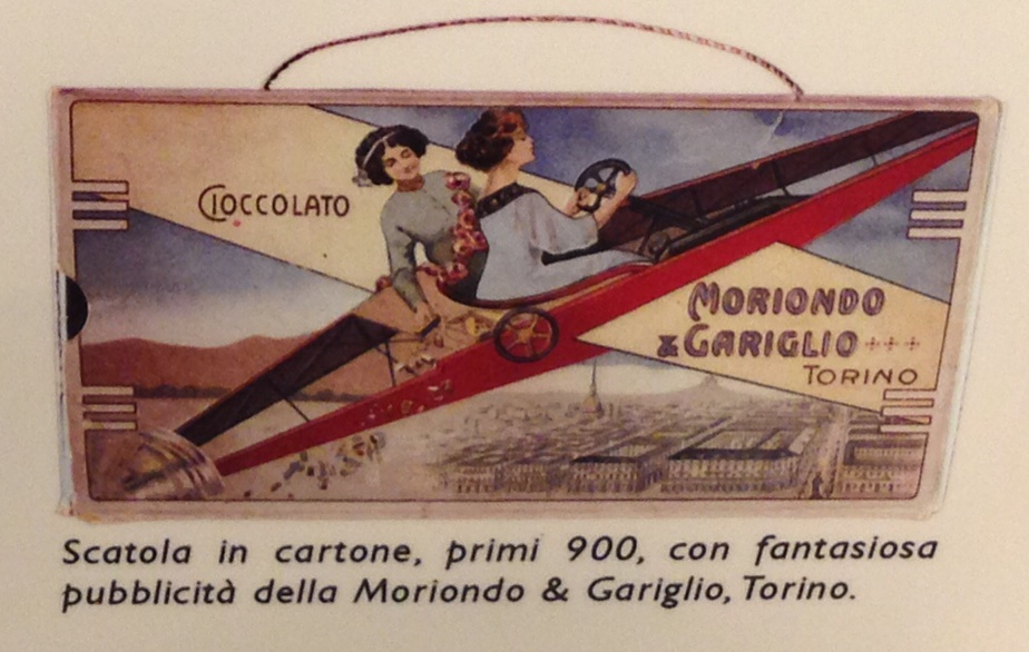 Scatola in cartone contenente cioccolato, primi 900, Moriondo&Gariglio